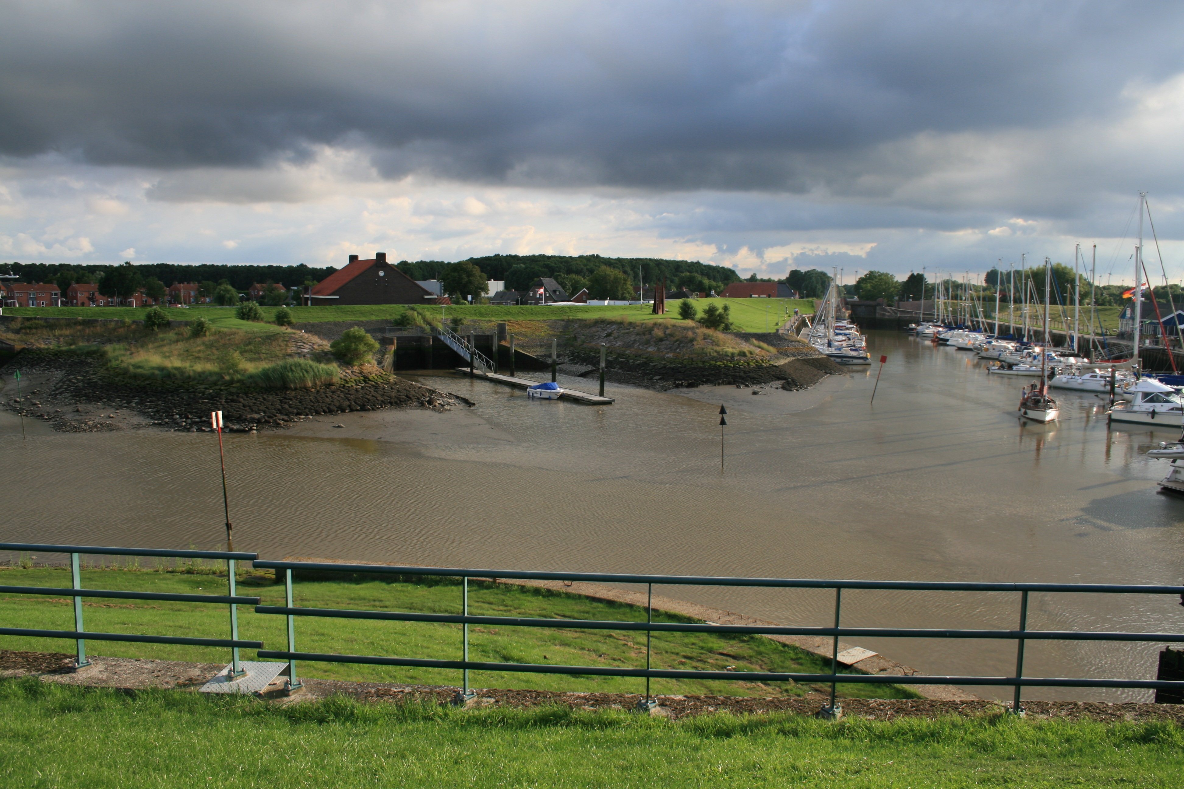 Termunterzijl 18 Binnenhaven (2010)